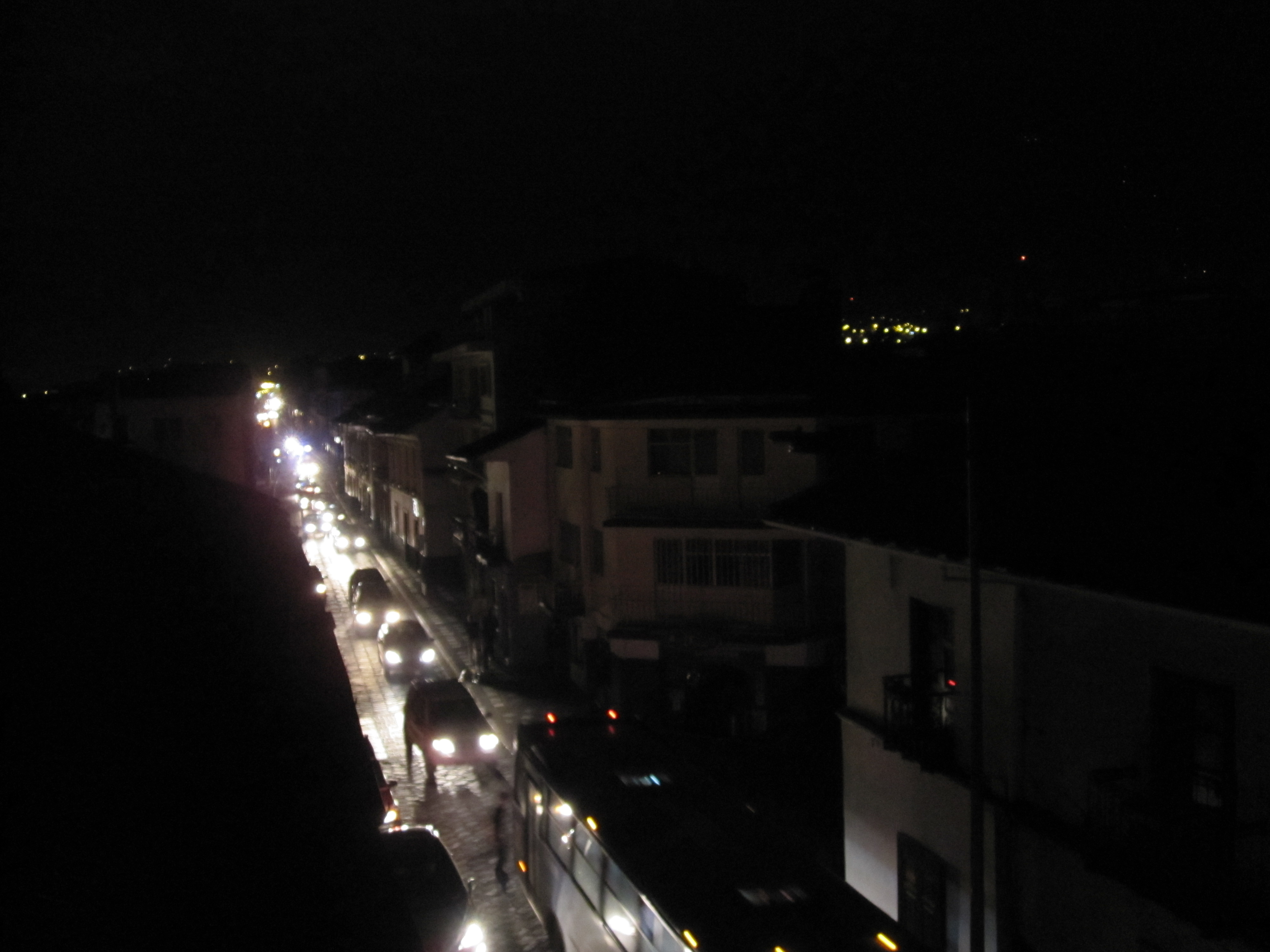 Calle Larga during power cut (see w:2009 Ecuador electricity crisis), Cuenca, Ecuador